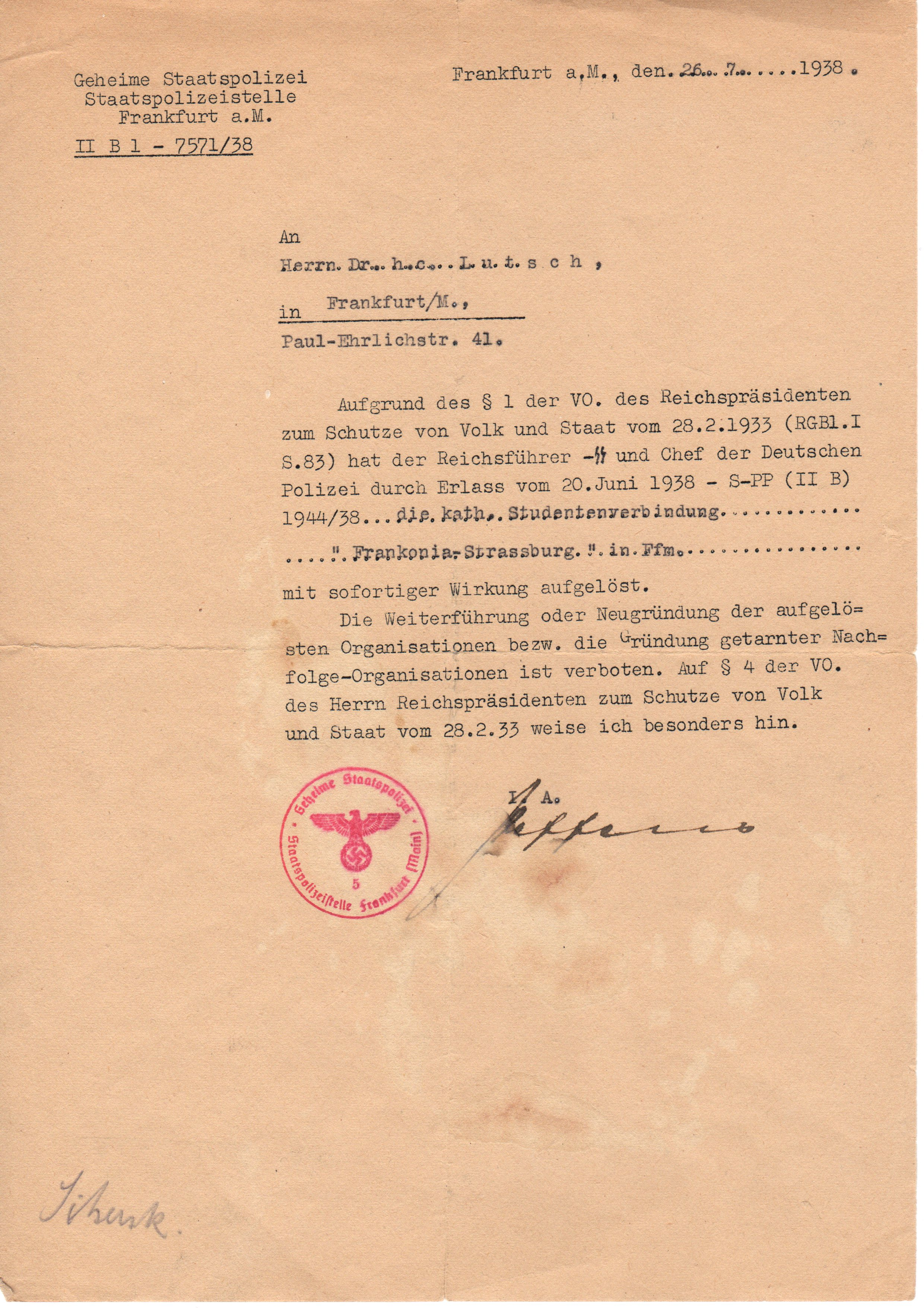 Auflösungsbescheid der Frankonia Straßburg 1938